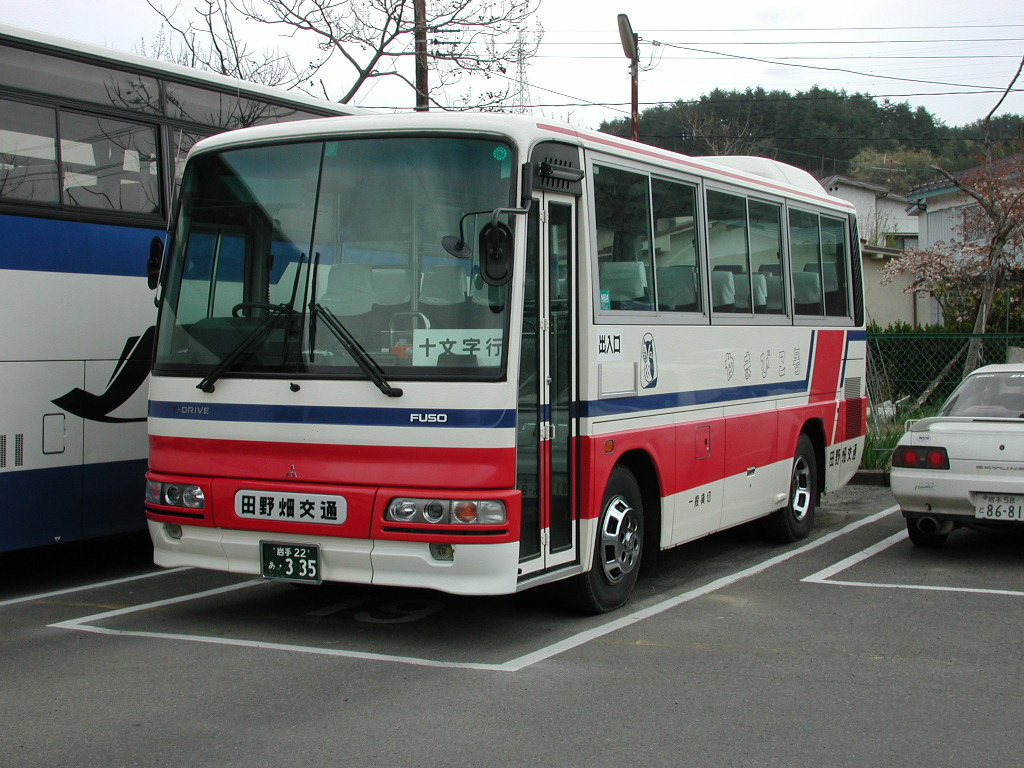 旧岩泉営業所にて、許可を得て撮影